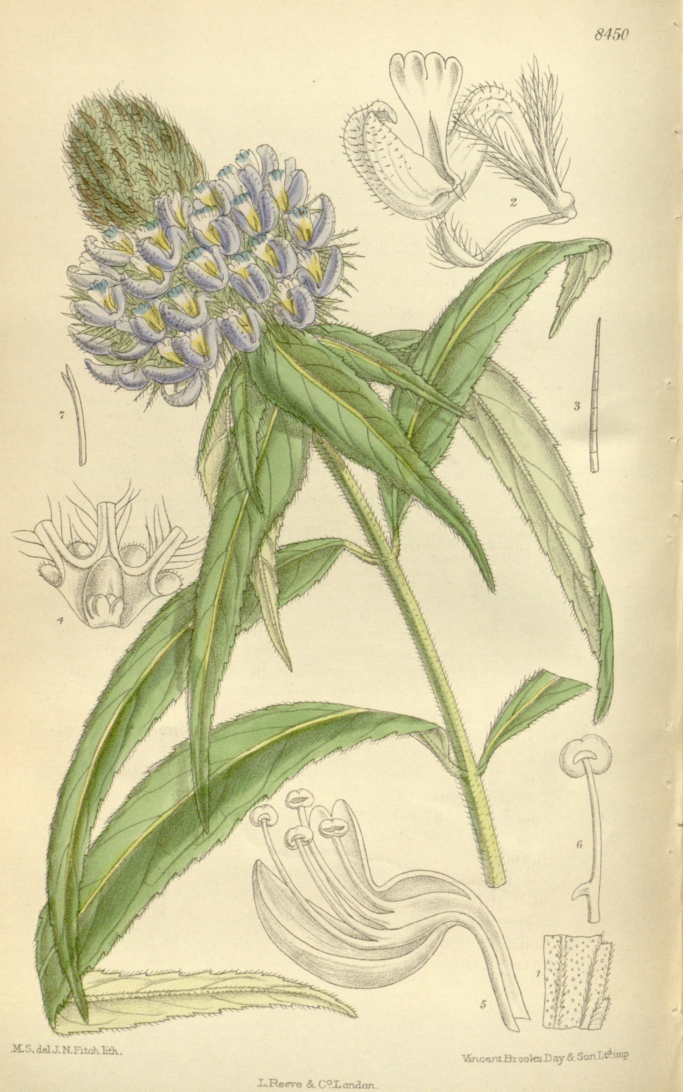 Pycnostachys dawei (= Pycnostachys speciosa), Lamiaceae